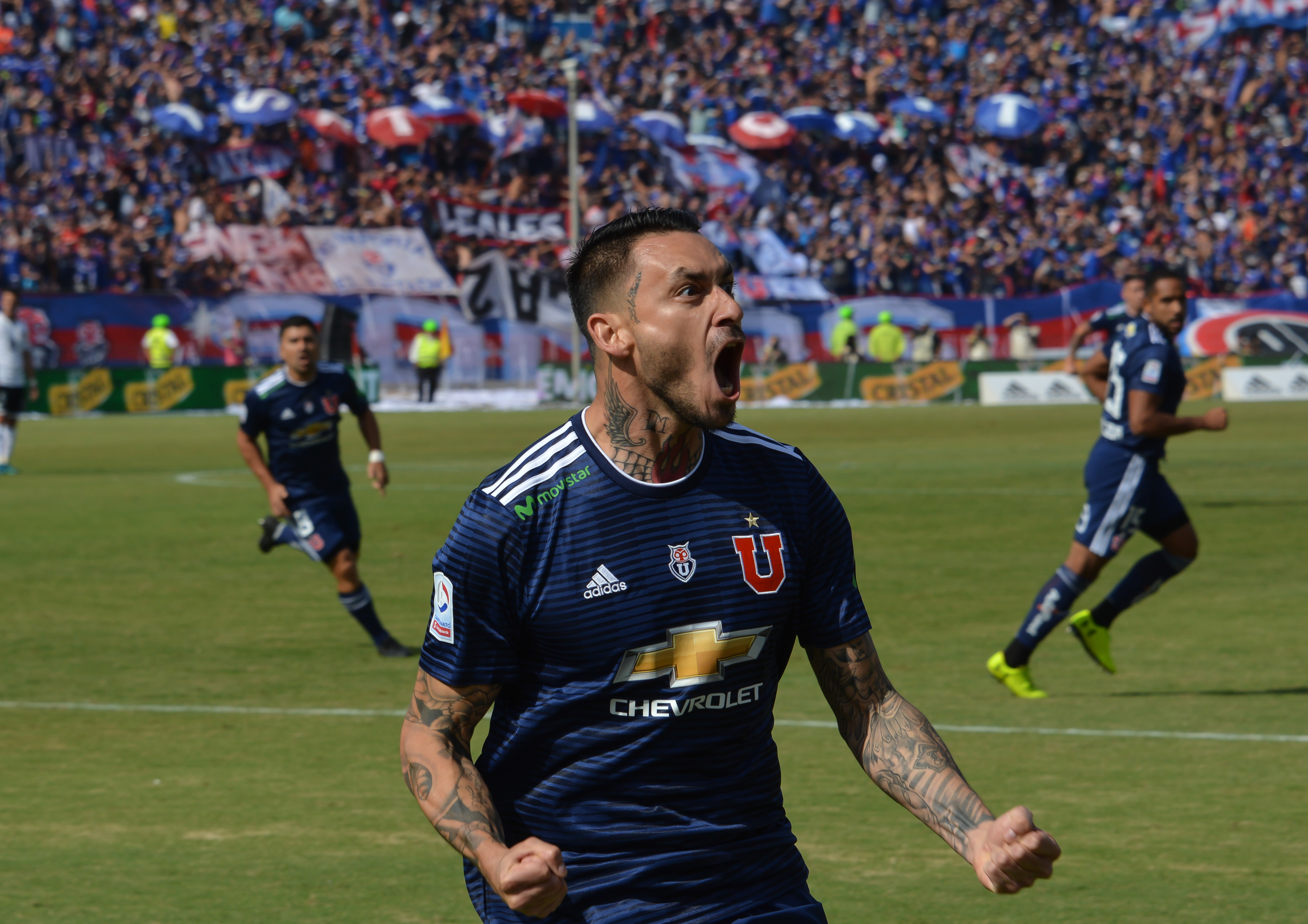 Universidad de Chile v Colo-Colo, Estadio Nacional, Santiago, Chile.